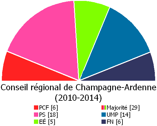 Composition du conseil régional depuis les élections de 2010/